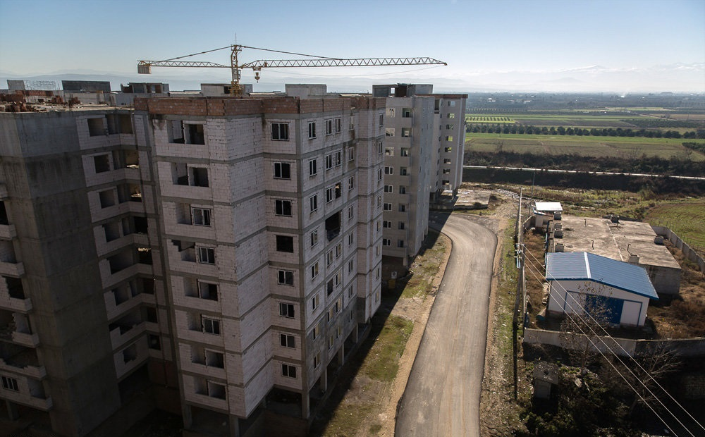 خانه های در حال ساخت در ساری